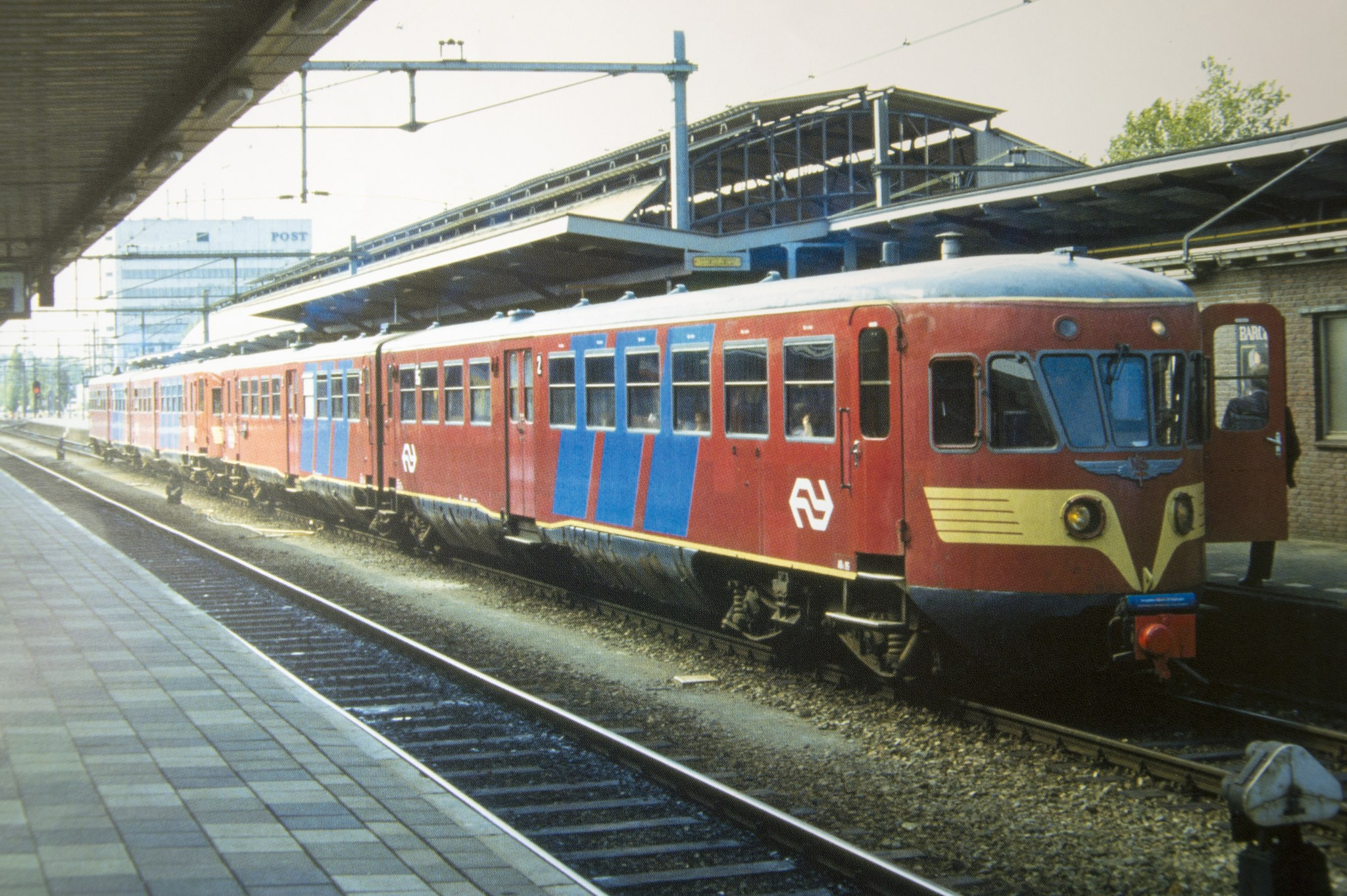 De Blauwe Engel werd na 1958 rood geschilderd. Tot in het begin van de jaren 80 deden de stellen nog volop dienst op de secundaire lijnen in het noorden en het oosten van de NS. Scan van foto Dank aan OV museum Doetinchem